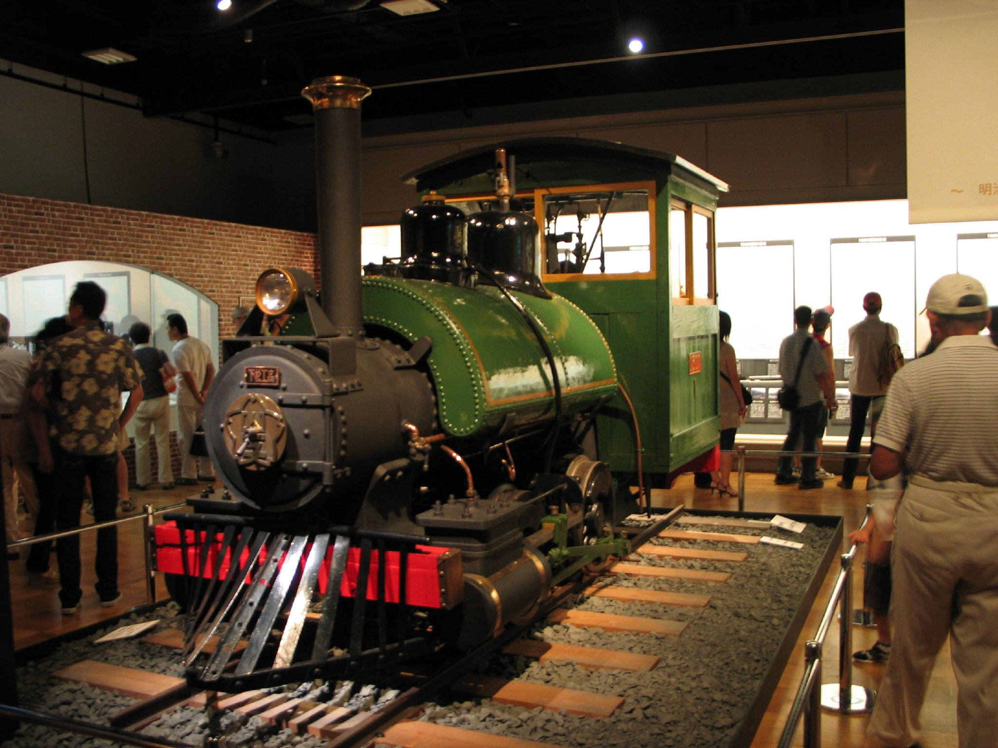 下工弁慶号@江戶東京博物館